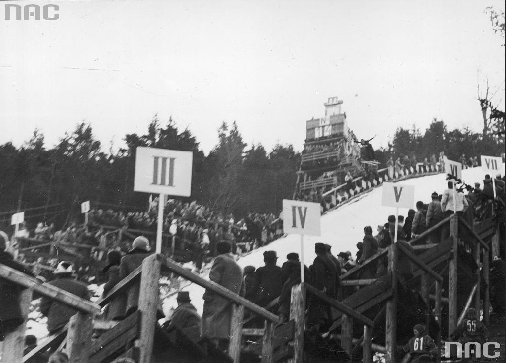 Une vue générale du tremplin lors de la compétition de sauts.